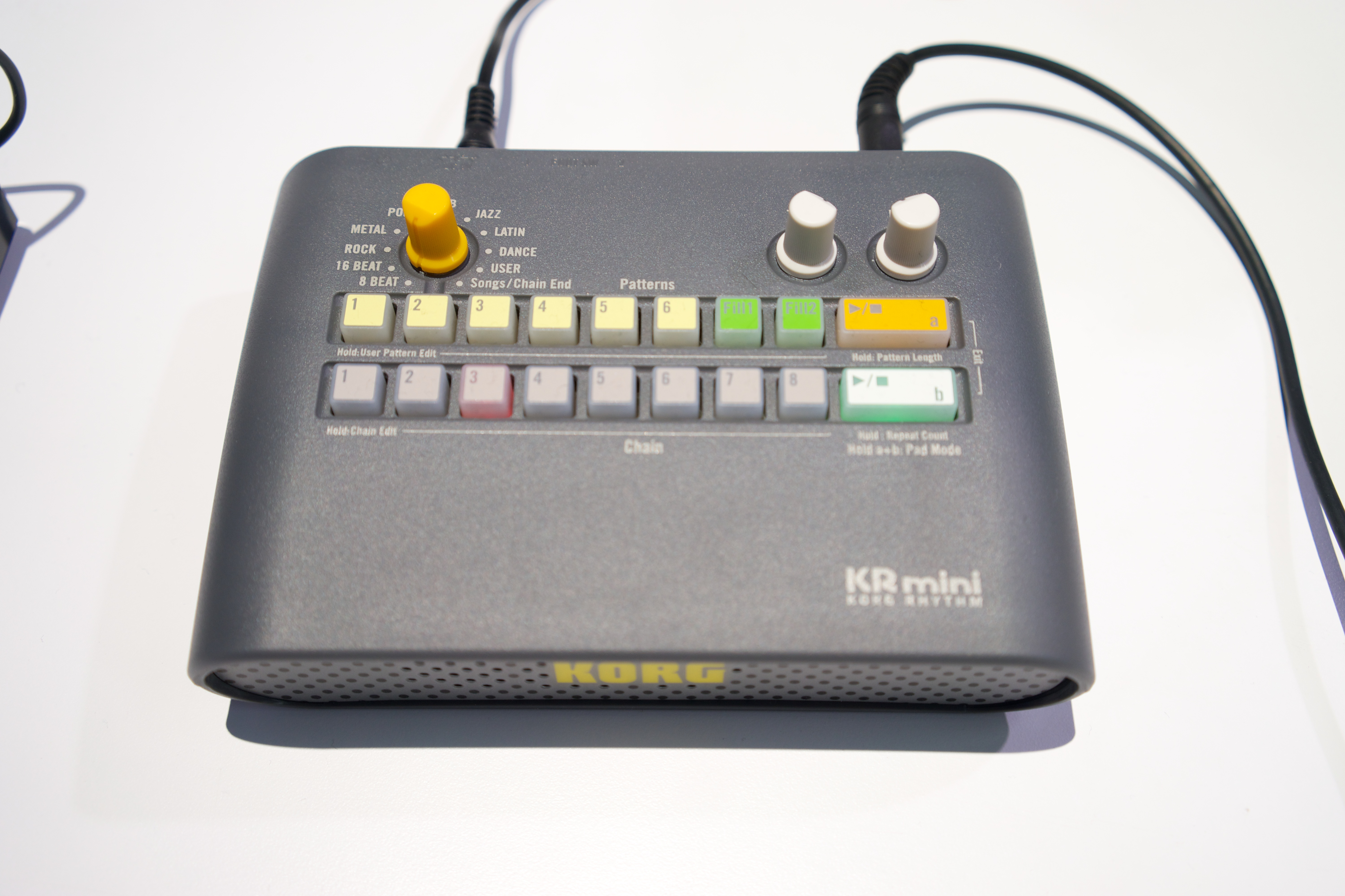 KORG KR-mini Korg Rhythm